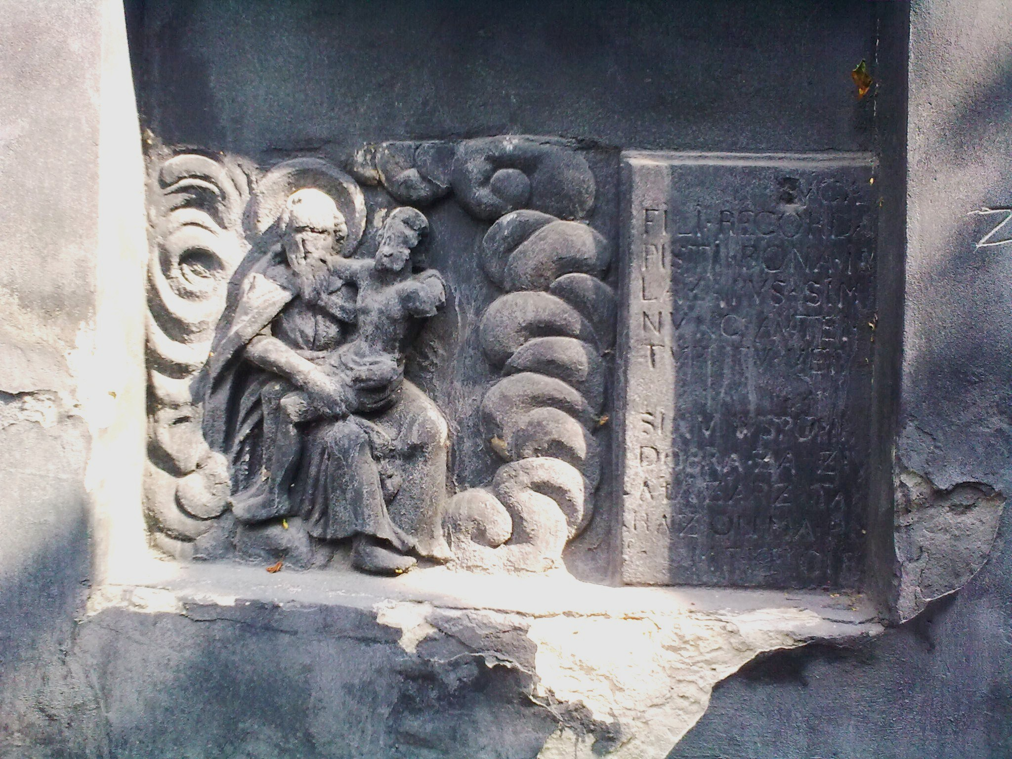 Płaskorzeźba w murze Szpitala Łazarza